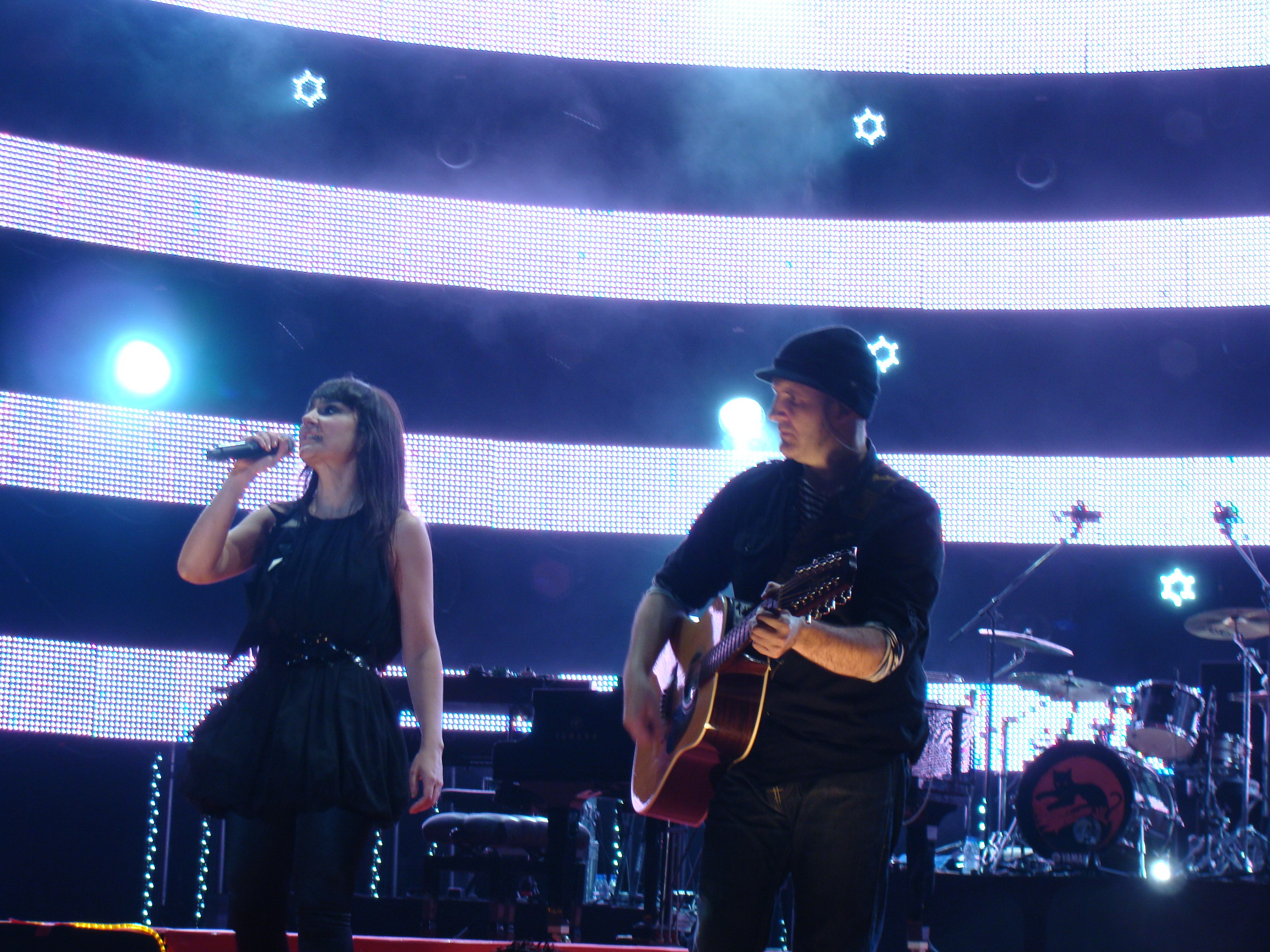 Banda española Amaral Licensing